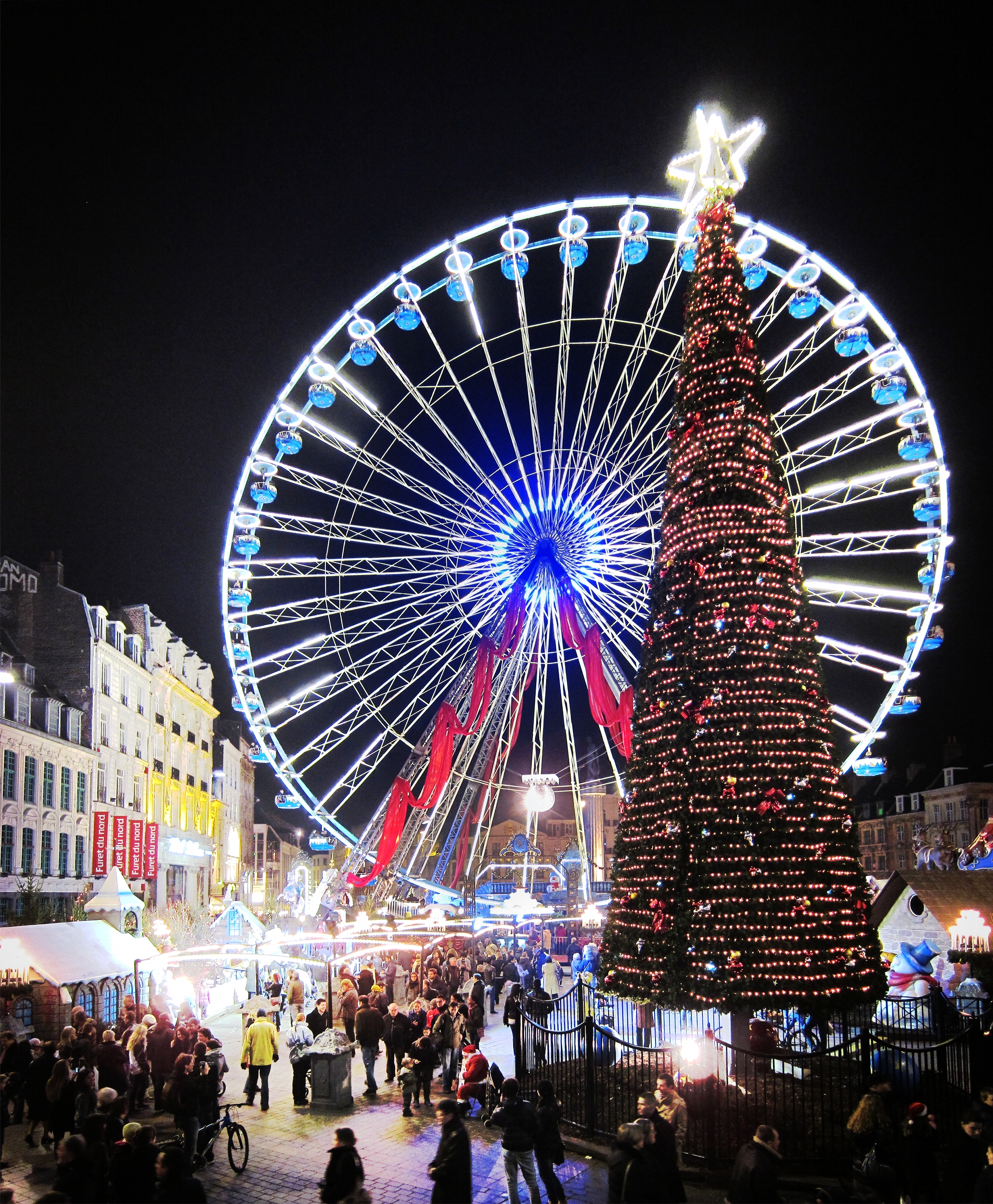 Grande roue sur la Grand Place de Lille (Nord).